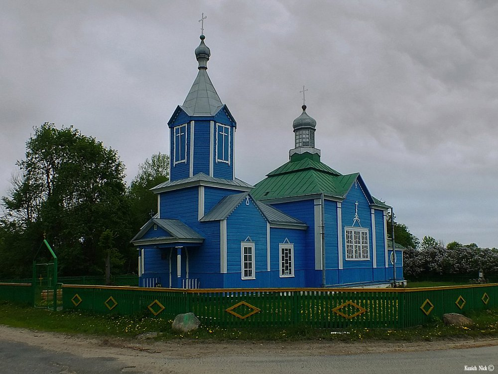 Пашукі. Свята-Андрэеўская царква